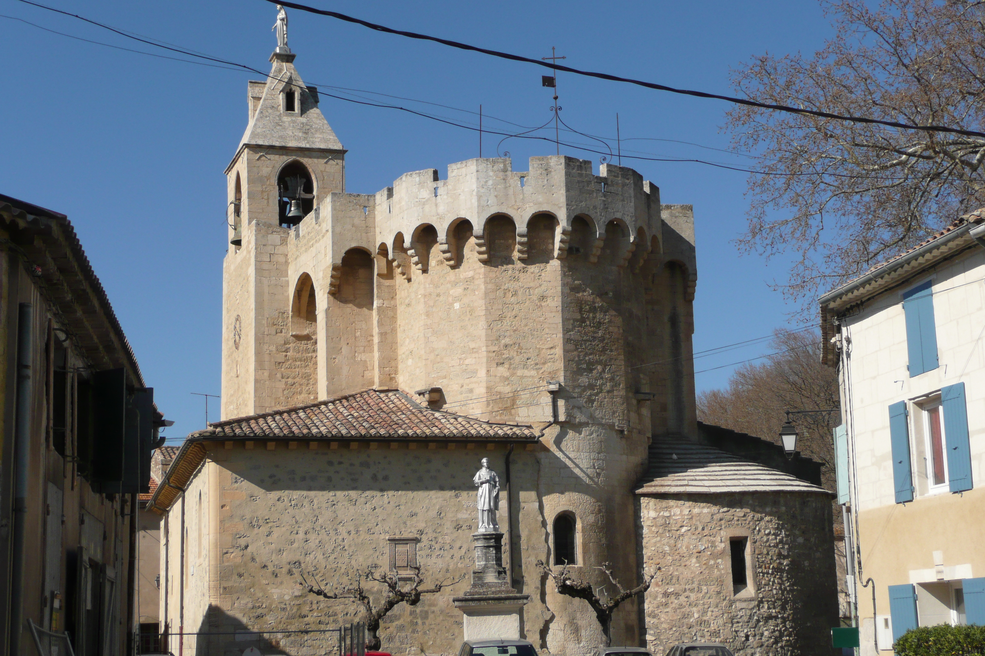 Eglise à Saint Andiol.